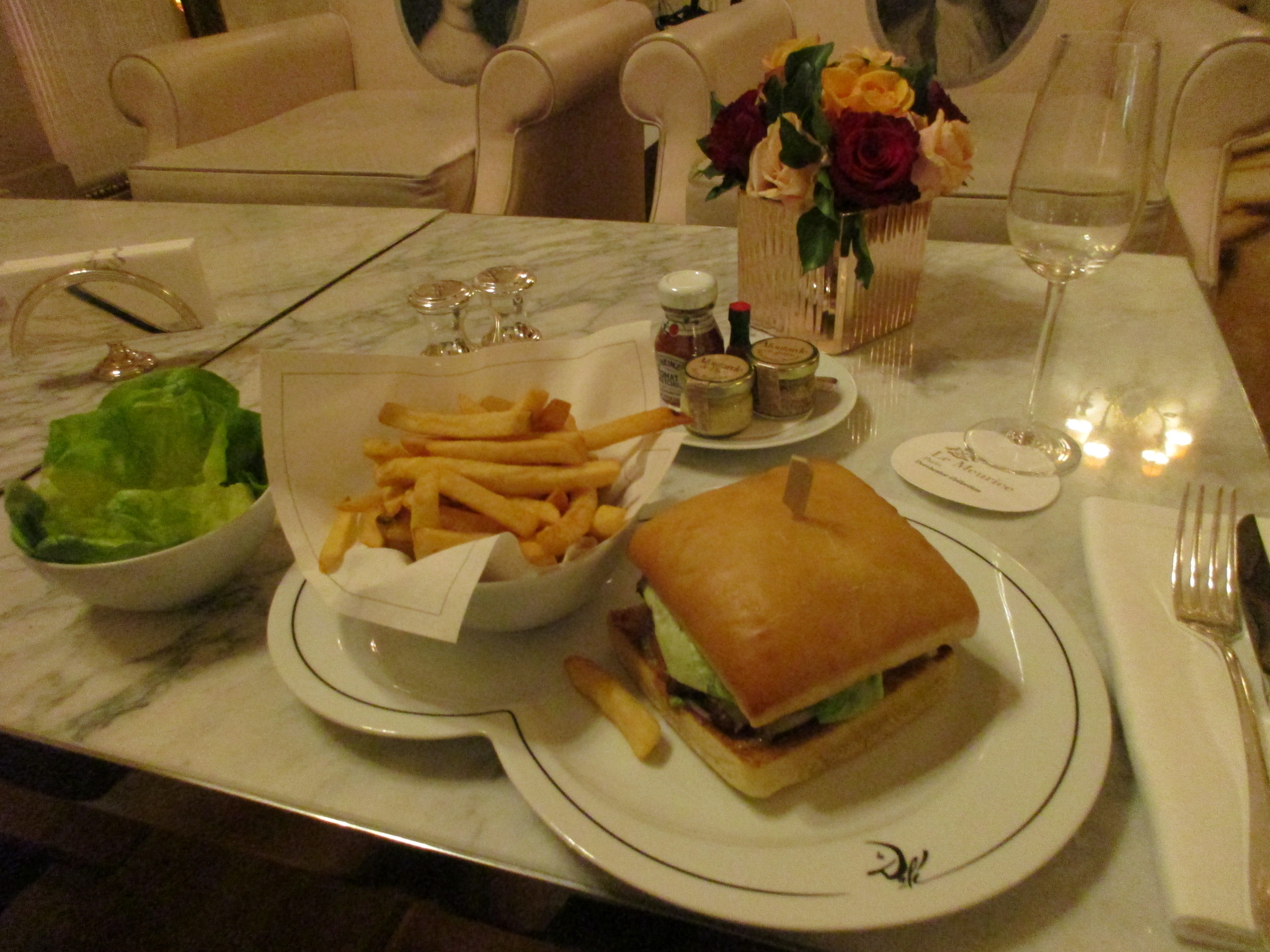 Hôtel Meurice (Paris) : Burger Pop Art (hommage à Andy Warhol)